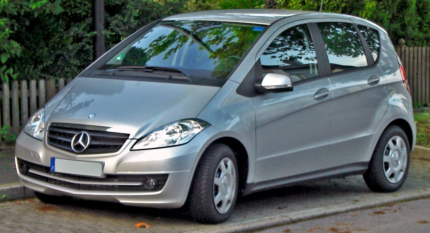 Mercedes A-Klasse (W169)